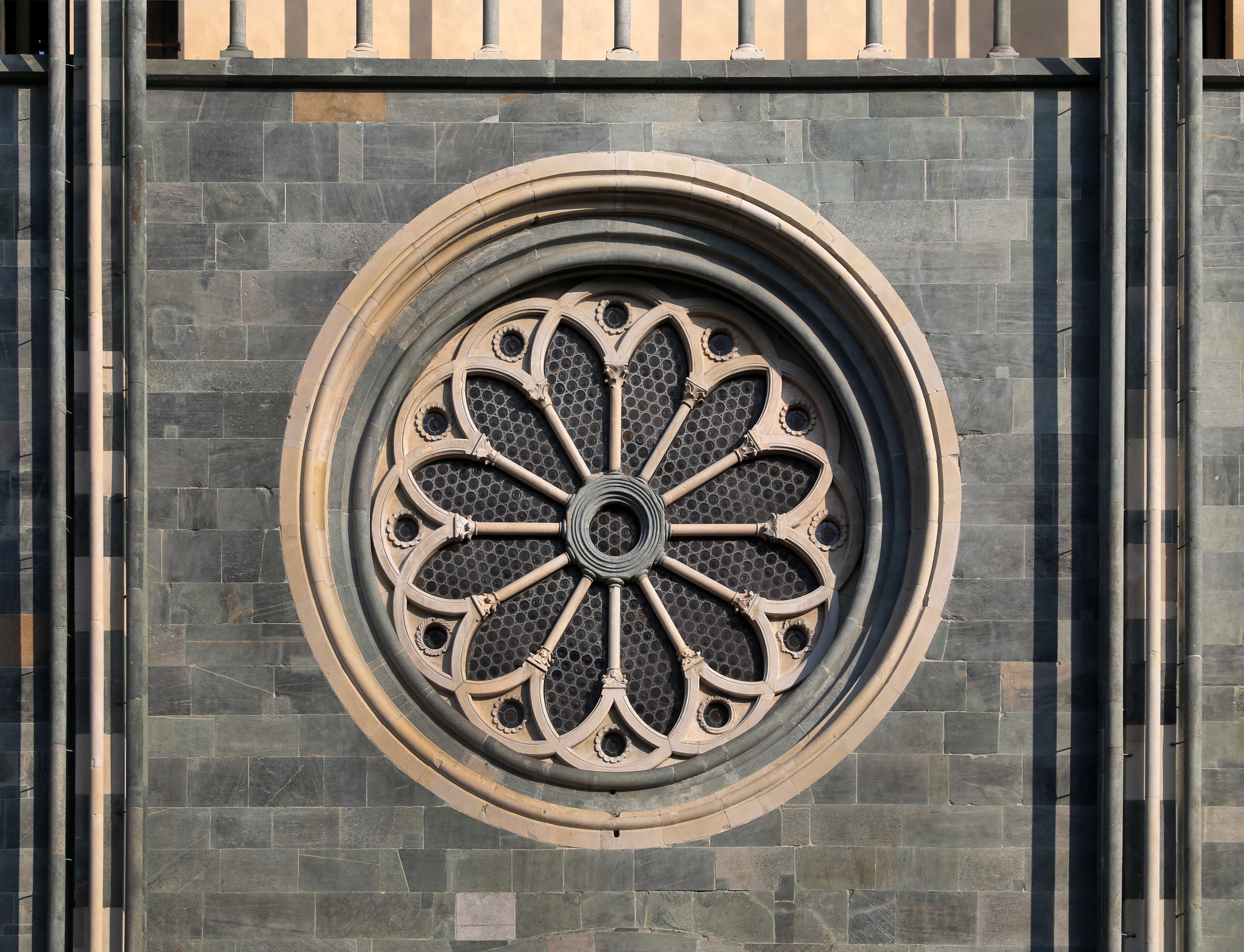 basilica di Sant'Andrea This is a photo of a monument which is part of cultural heritage of Italy.